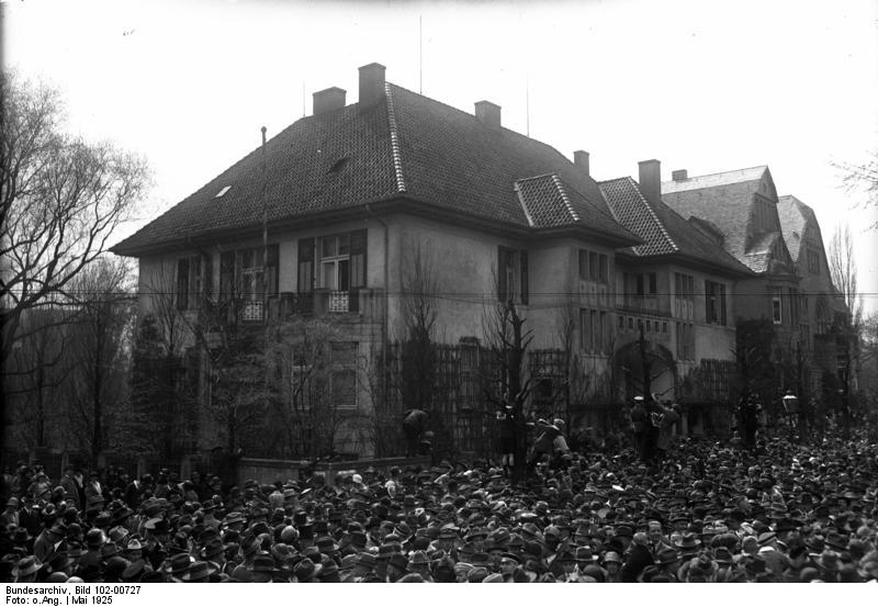 Die Villa des Reichspräsidenten von Hindenburg in Hannover am Tag seiner Ernennung zum Reichspräsidenten.